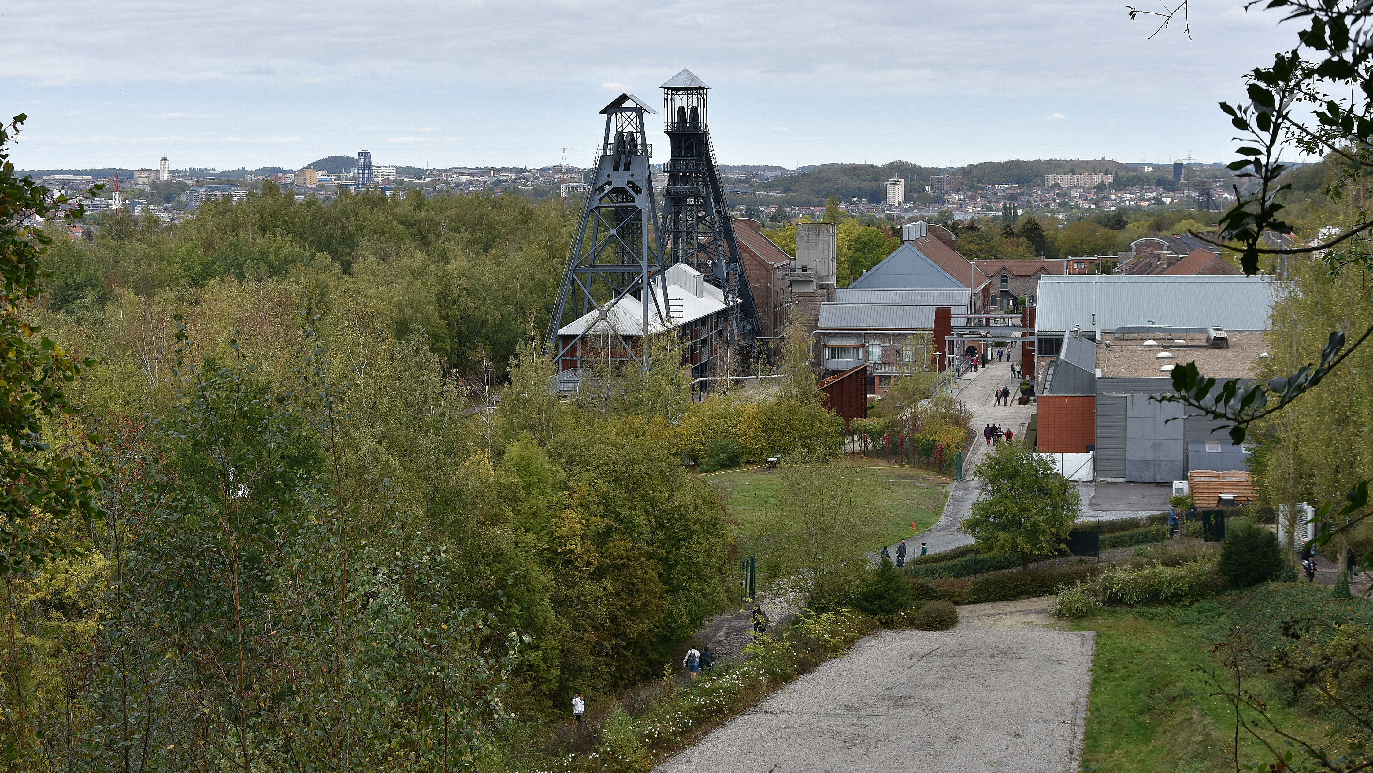 Vanaf terril Bois du Cazier - Marcinelle 7-10-2018 This photo of immovable heritage has been taken in the Walloon Region